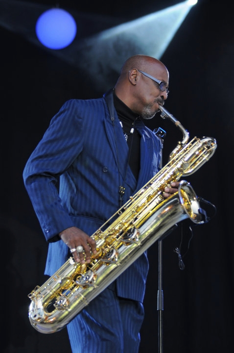 Sir Waldo Weathers auf der Bühne beim Saxophon spielen.